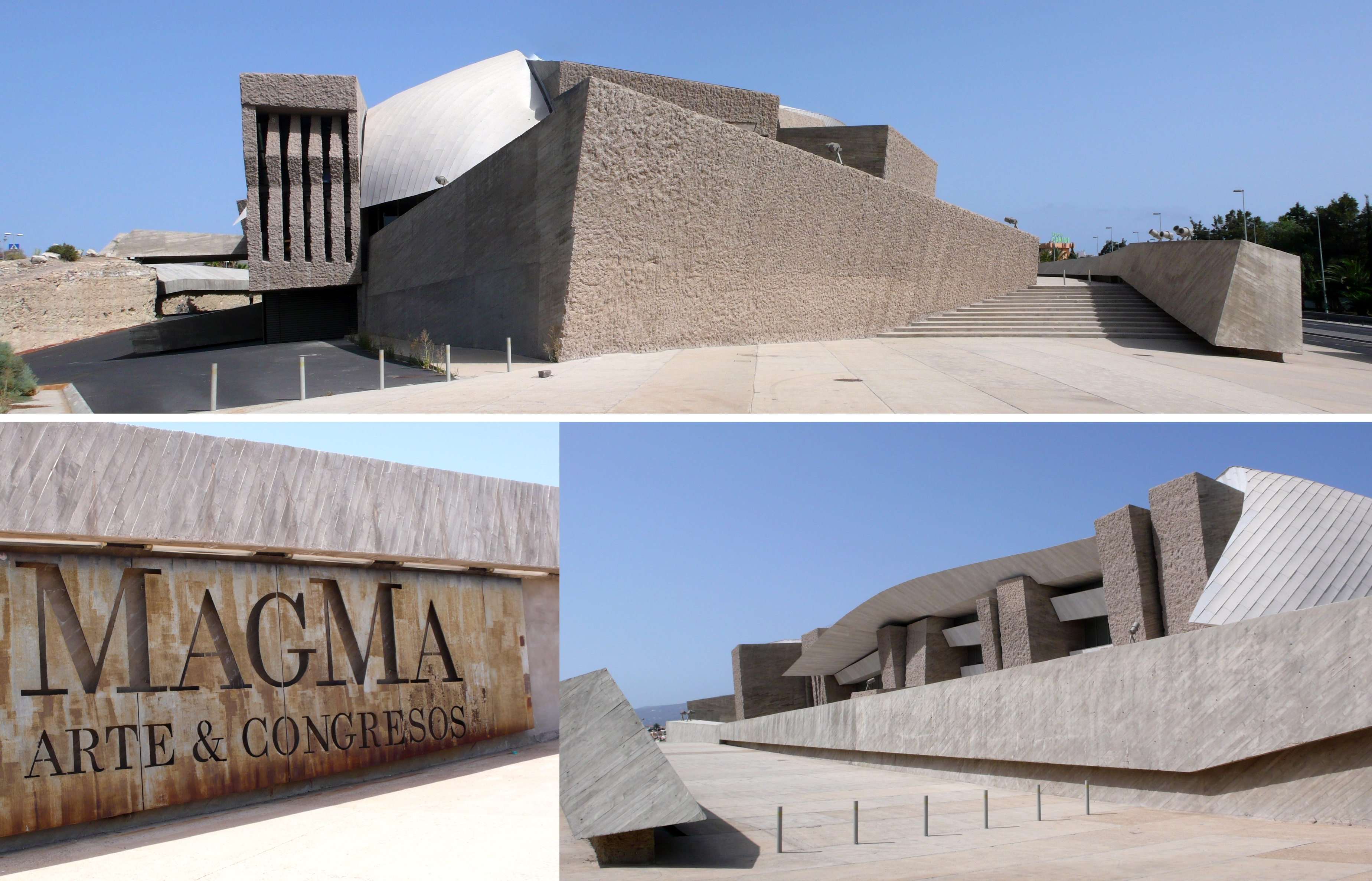 Magma arte y congresos. Centro de conferencias en Adeje, Tenerife. Arquitectos: Artengo, Menis y Pastrana (AMP)